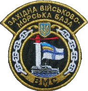 Нарукавний знак, Західна військово-морська база